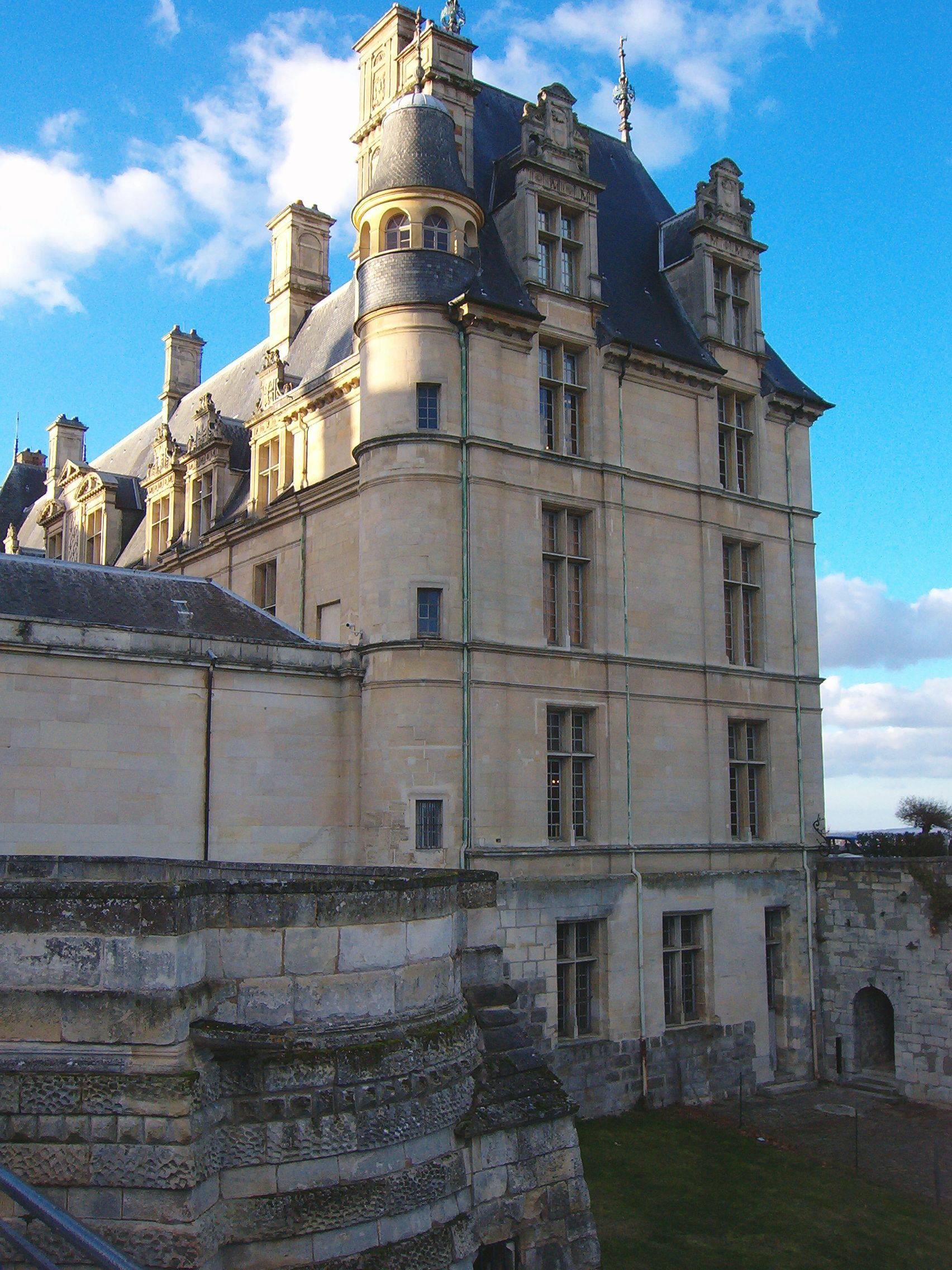 Chateau d'Ecouen